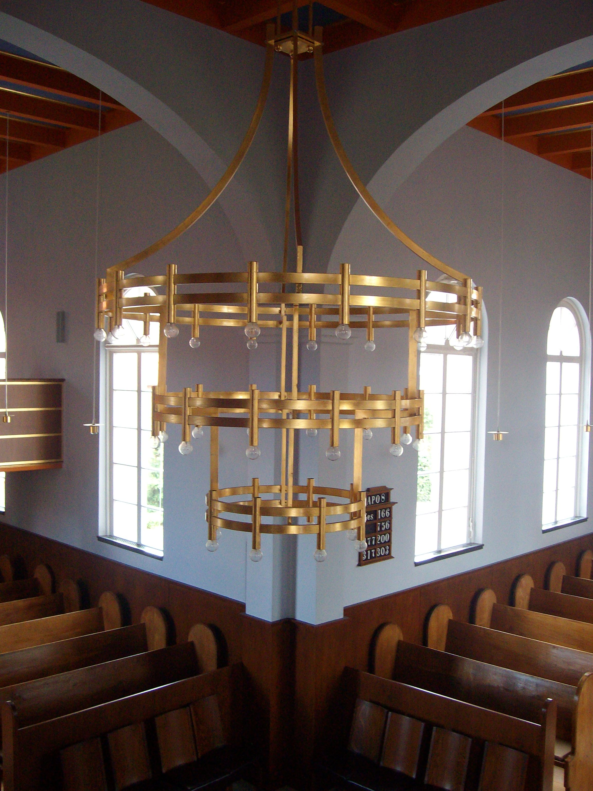 Leuchter der Kirche in Jemgum, Ostfriesland